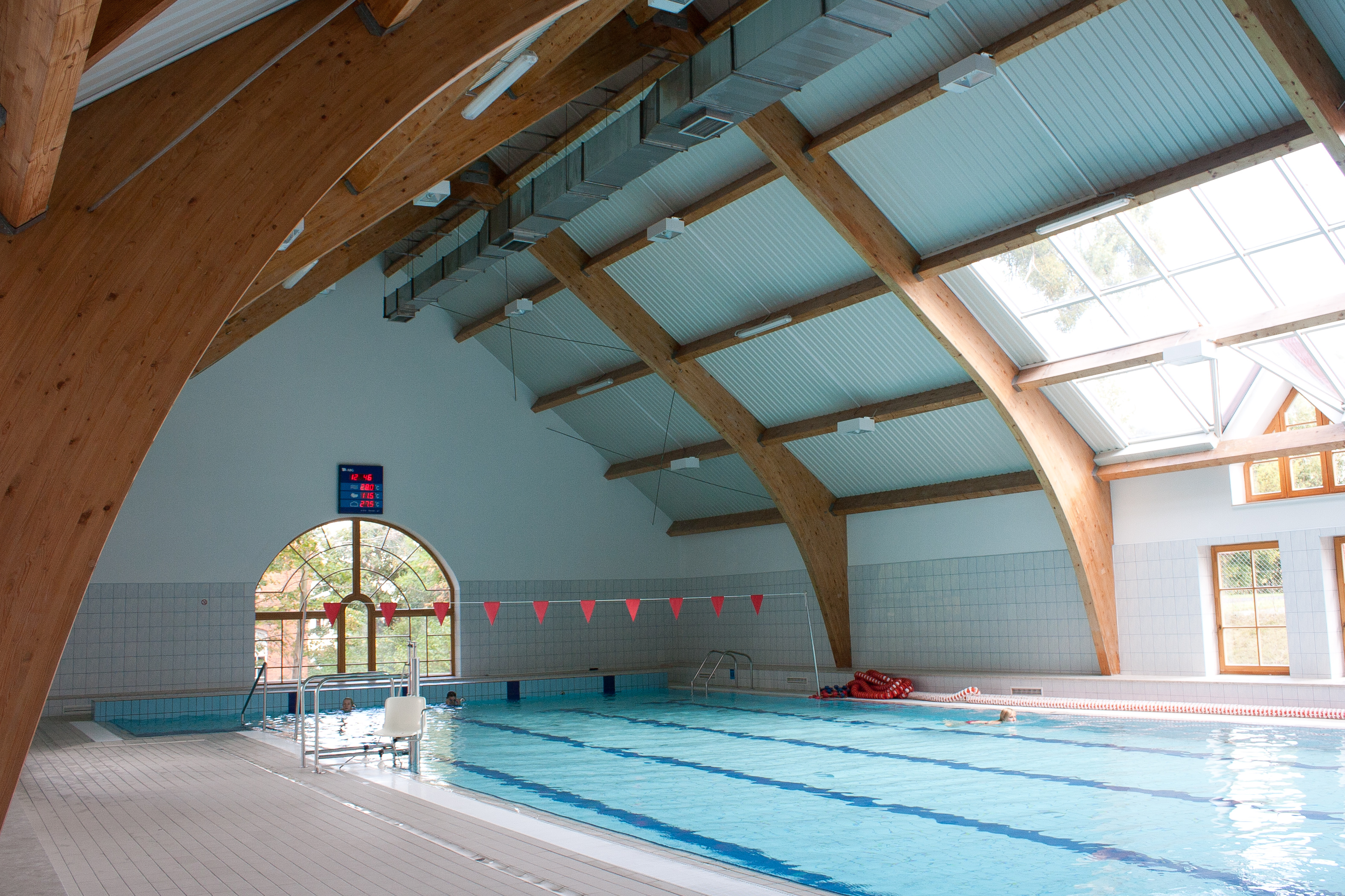 basen przy ul. Lengowskiego w Olsztynie